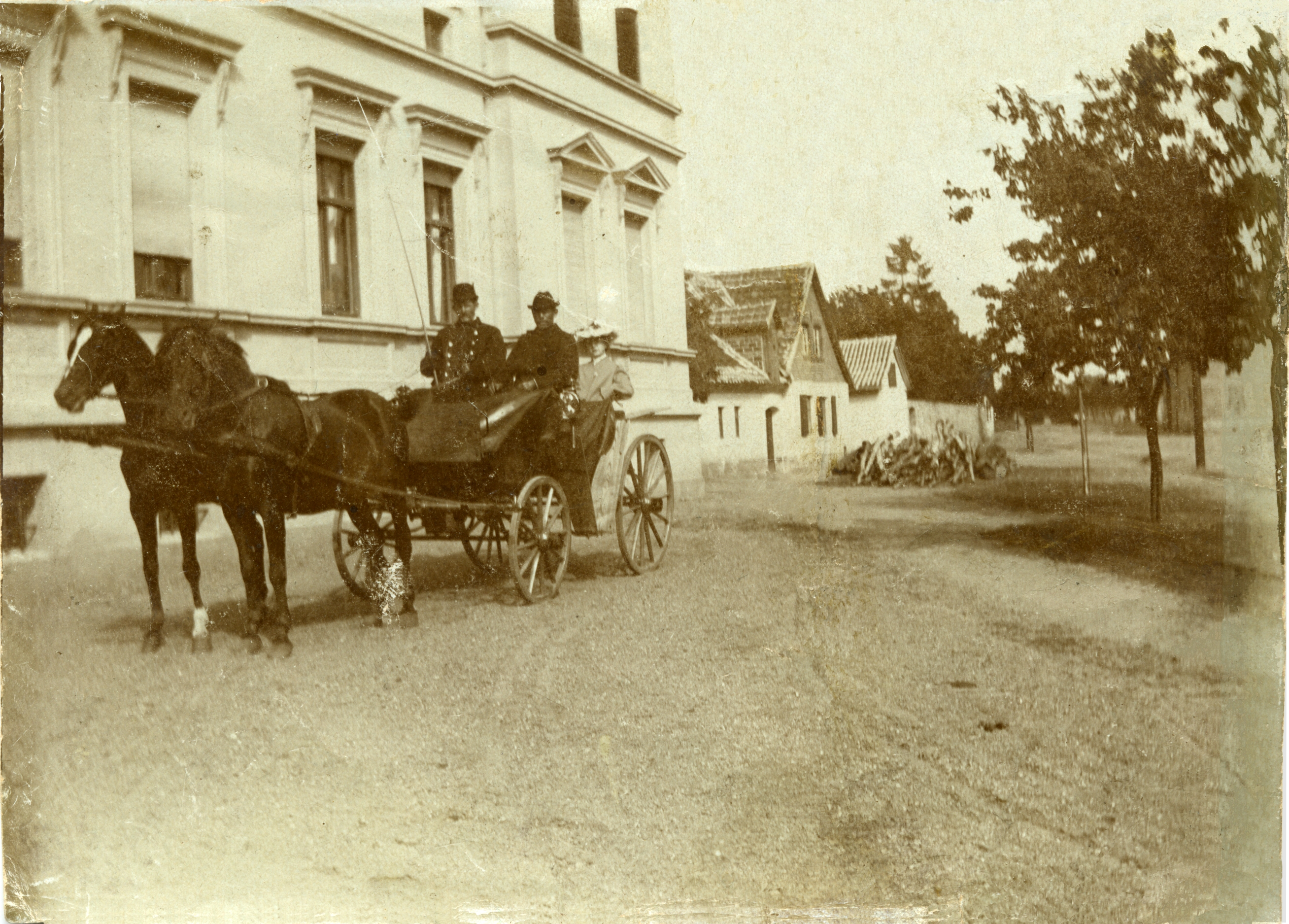 Andreas Heinrichs, Kutscher, vor dem Haus Unterdorf 46, Reinstedt, Deutschland, ca. 1920 (?)